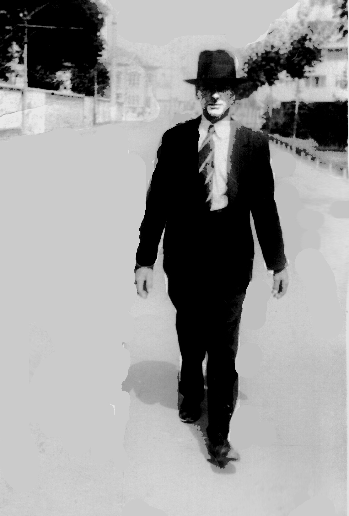 arhitelta Harminc iz Kulpina u Čehoslovačkoj